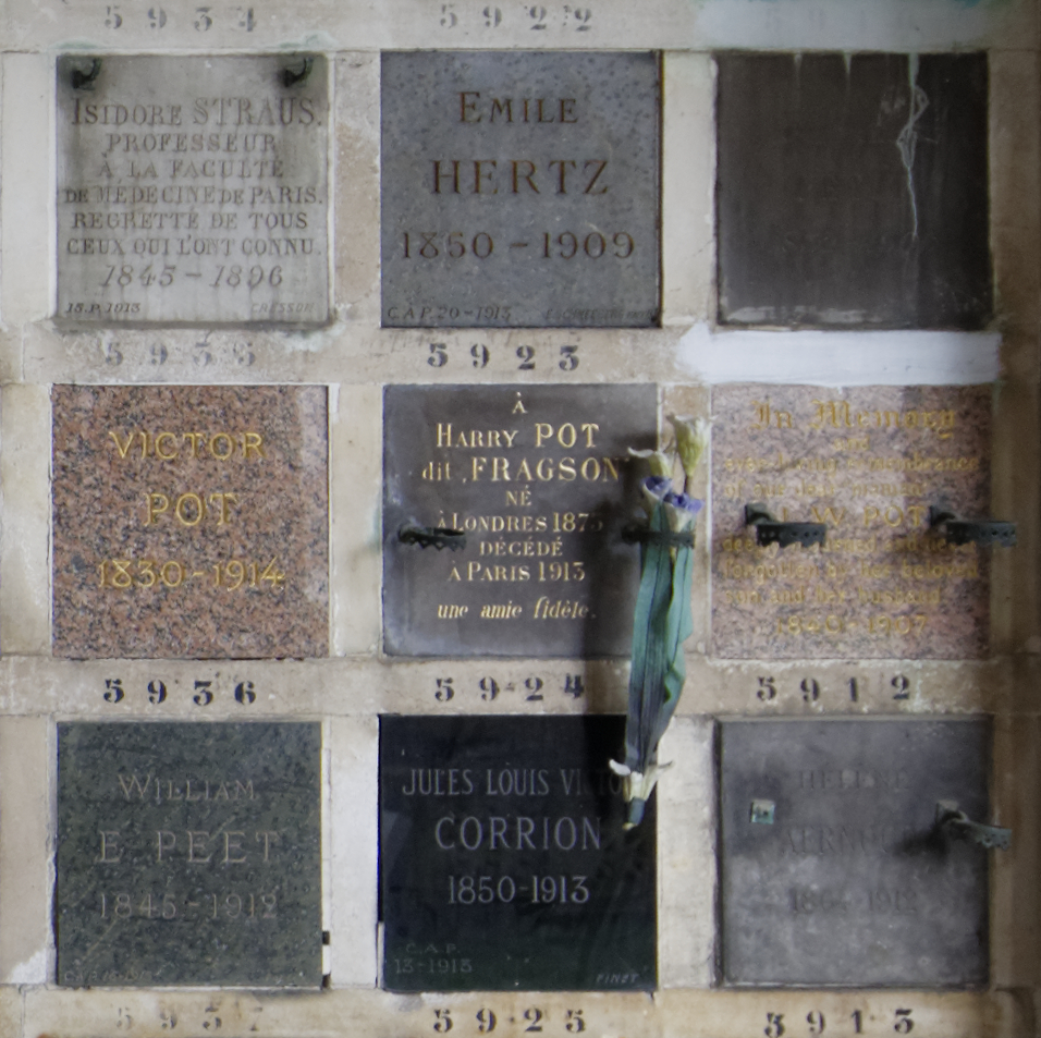 Cases du columbarium du cimetière du Père-Lachaise.